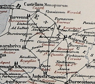 carte proposée par Desjardins.